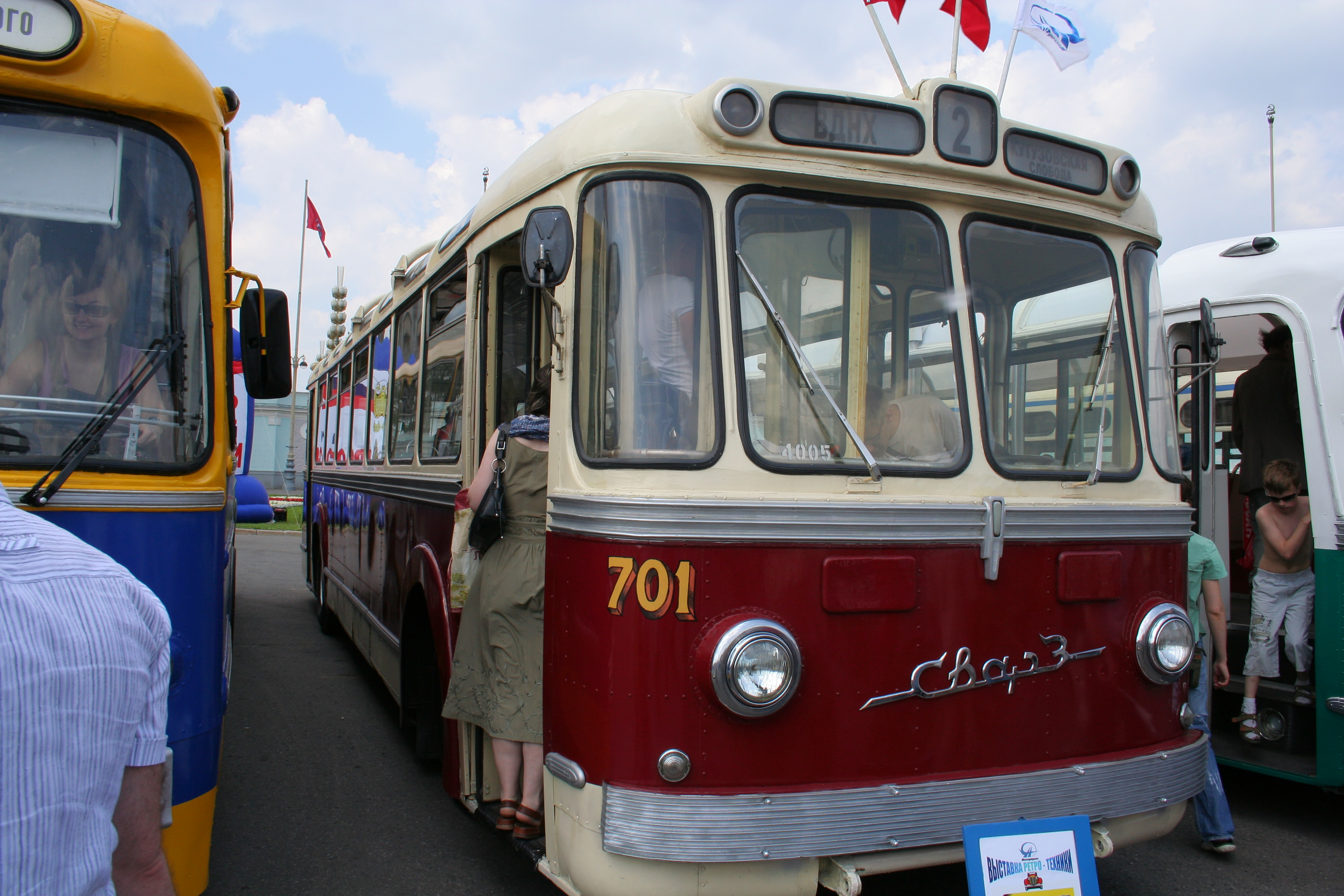 Ретро-троллейбус МТБЭС Мосгортранса 1963 года выпуска на показе около ВВЦ 12 июня 2010 года.